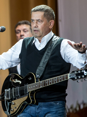 Николай Расторгуев во время презентации гимна Сухопутных войск Российской Федерации «Вперед, пехота!»